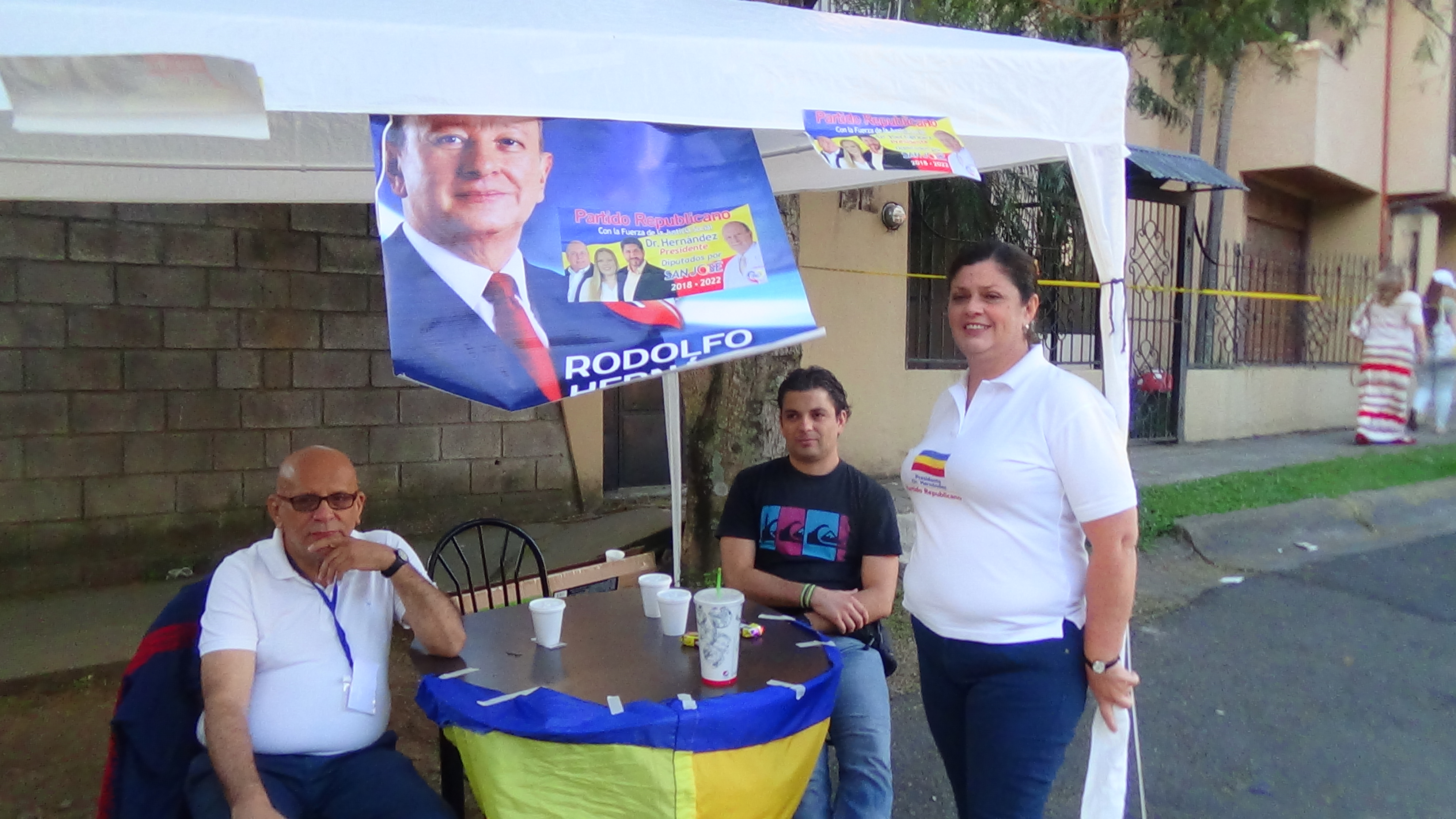 Stand del Dr. Rodolfo Hernández